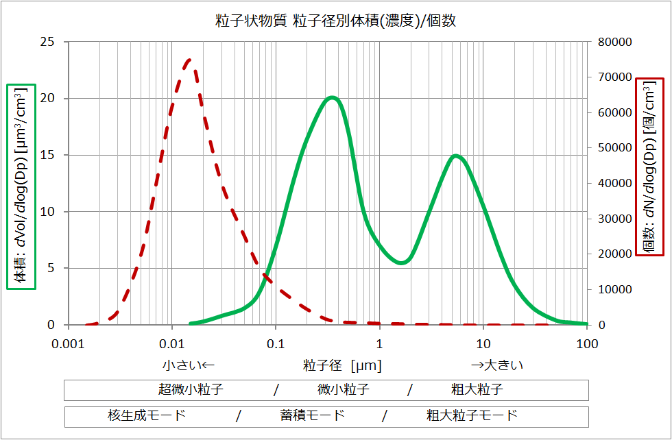 粒子状物質（大気エアロゾル粒子の粒子径-体積（濃度）分布および粒子径-個数分布のグラフ。 出典：国際環境経済研究所 PM2.5実態研究委員会「目に見えないのにどうやって？ PM2.5の「測り方」」、2013．(原典:William C. Hinds, 1999. "Aerosol Technology, J". Wiley & Sons New York を改変)